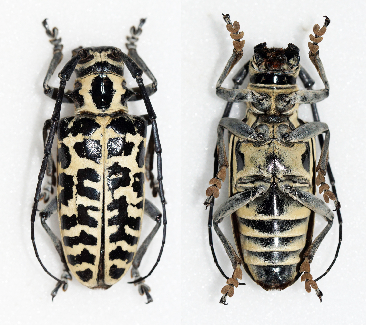 Fabricius,1792 Sex: ? Data: 14-07-14 - Oklahoma - USA Size: ?